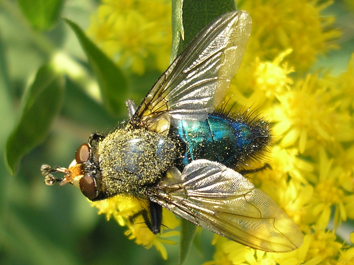 Male Cynomya mortuorum (Linnaeus 1761) : synonym Cynomyia mortuorum (det. Theo Zeegers). Family Calliphoridae. Location: Unused patch of land of business park "Boeldershoek" near Hengelo (Overijssel) in the Netherlands. Keywords: fly of the dead, forensics, forensic science, forensic entomology. --- nl: Lijkenvlieg (Cynomya mortuorum of Cynomyia mortuorum) - mannetje. Locatie: Braakliggend stuk grond op bedrijventerrein "Boeldershoek", Hengelo (Overijssel), Nederland. Trefwoorden: forensisch onderzoek, forensische entomologie --- de: Totenfliege (Cynomya mortuorum oder Cynomyia mortuorum) - männlich. Ort: Brachliegendes Grundstück im Gewerbegebiet "Boeldershoek" bei Hengelo (Overijssel) in die Niederlande.